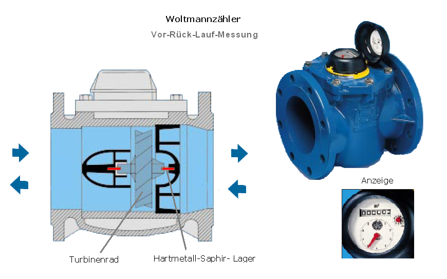 Schema. Ansicht Woltmannzähler